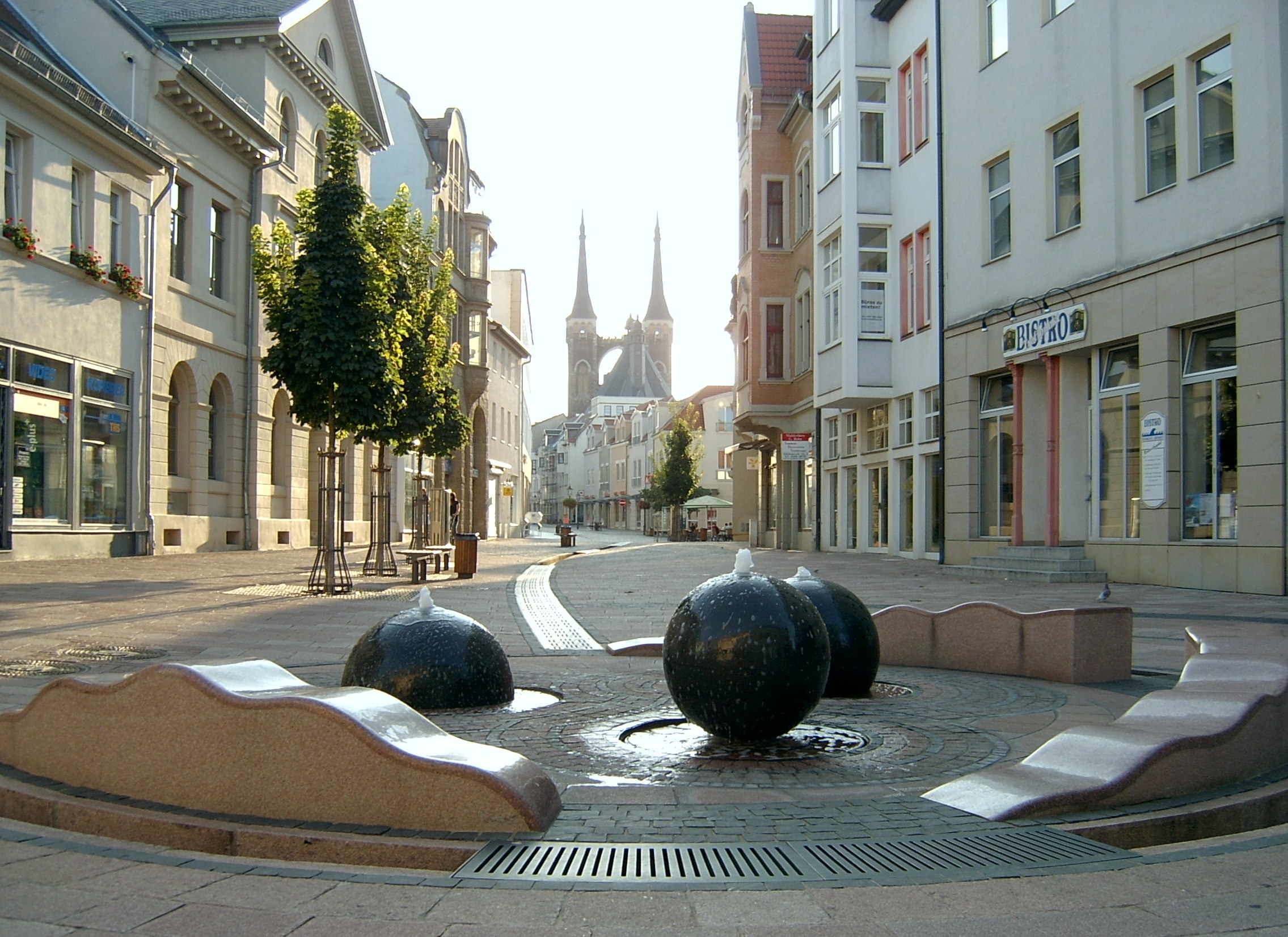 Blick vom Springbrunnen in der Schalaunischen Straße Richtung Buttermarkt/Markt. Im Hintergrund die Jakobskirche.